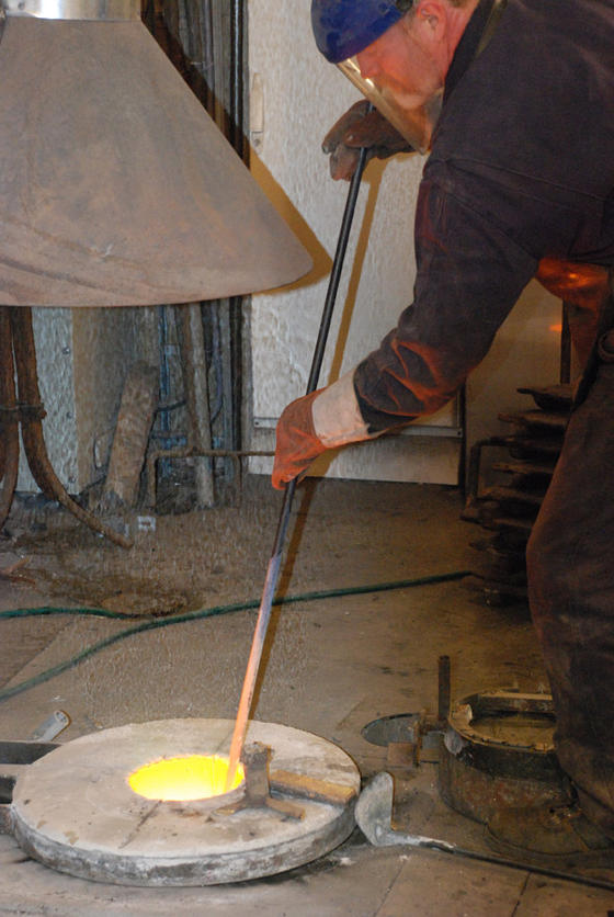 Gjørtlerfaget er et av fagene Norsk handverksutvikling arbeider for å videreføre i Norge. Foto: Inger Smedsrud/NHU